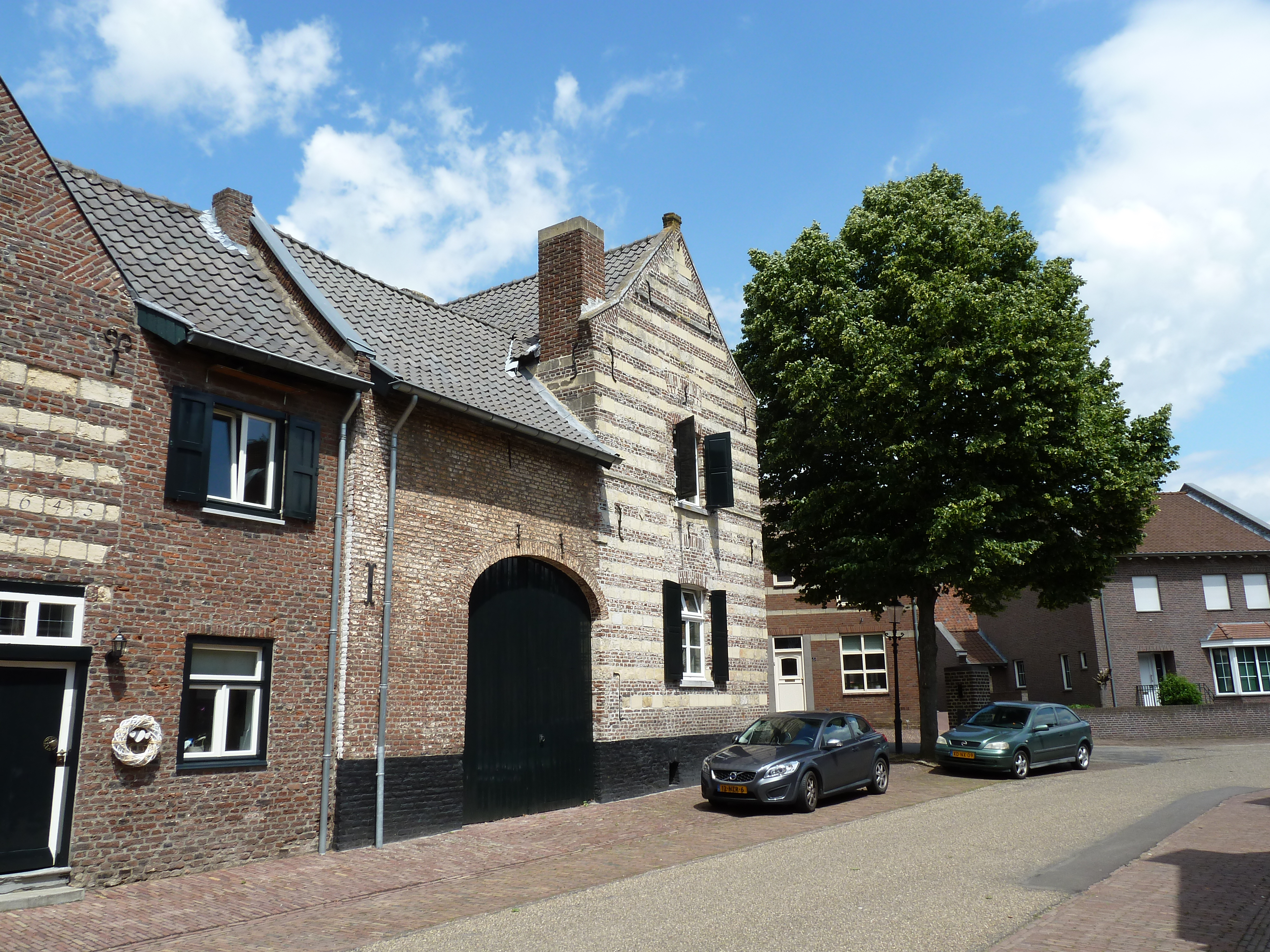 Hoolstraat 1, Urmond, Limburg, Nederland